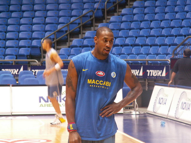 וויל סולומון צולם על-ידי אבי קדמי This picture was taken by Avi Kedmi